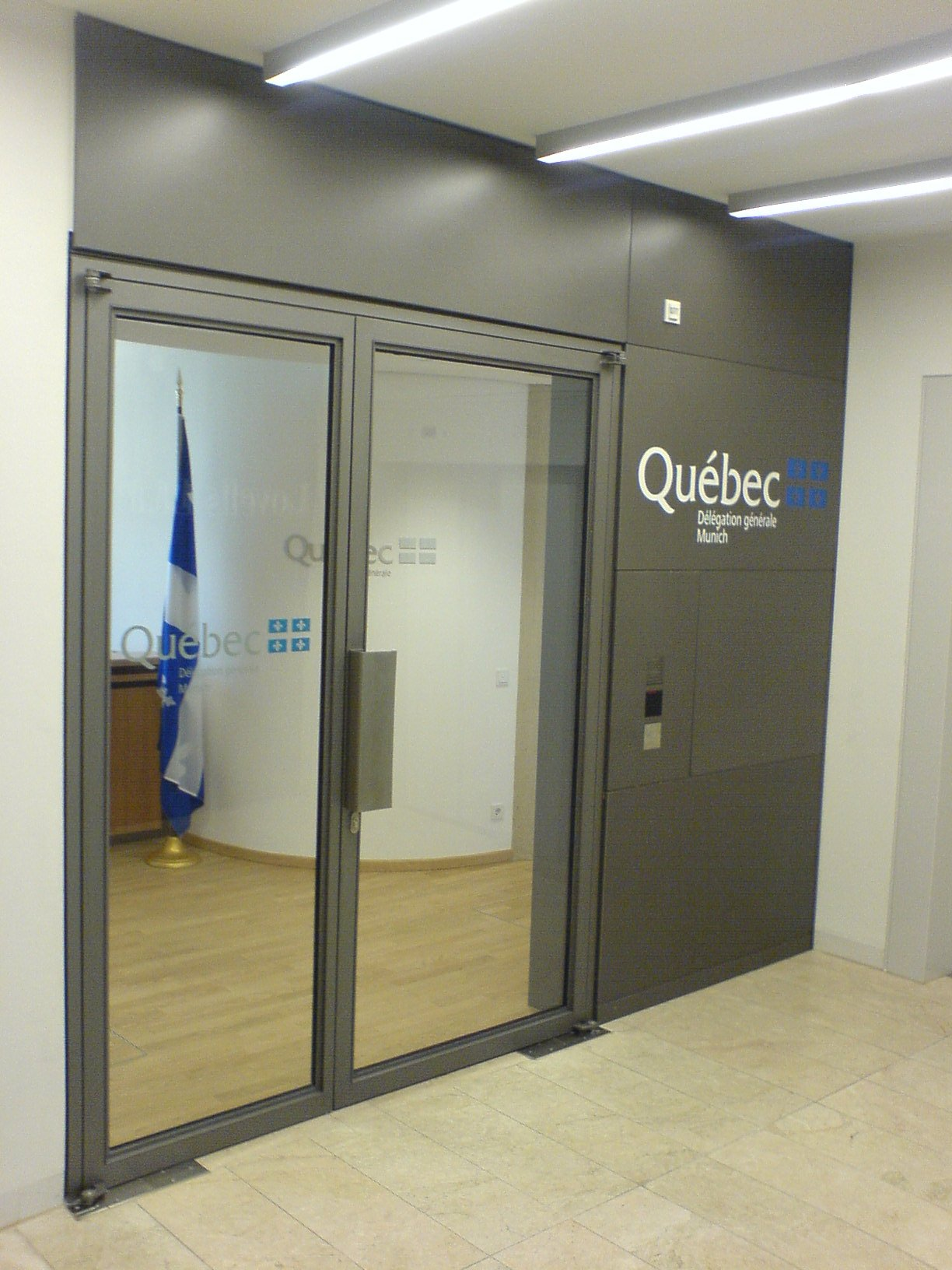 Vertretung der Regierung von Québec in München, Karl-Scharnagl-Ring 6, 80539 München [1].